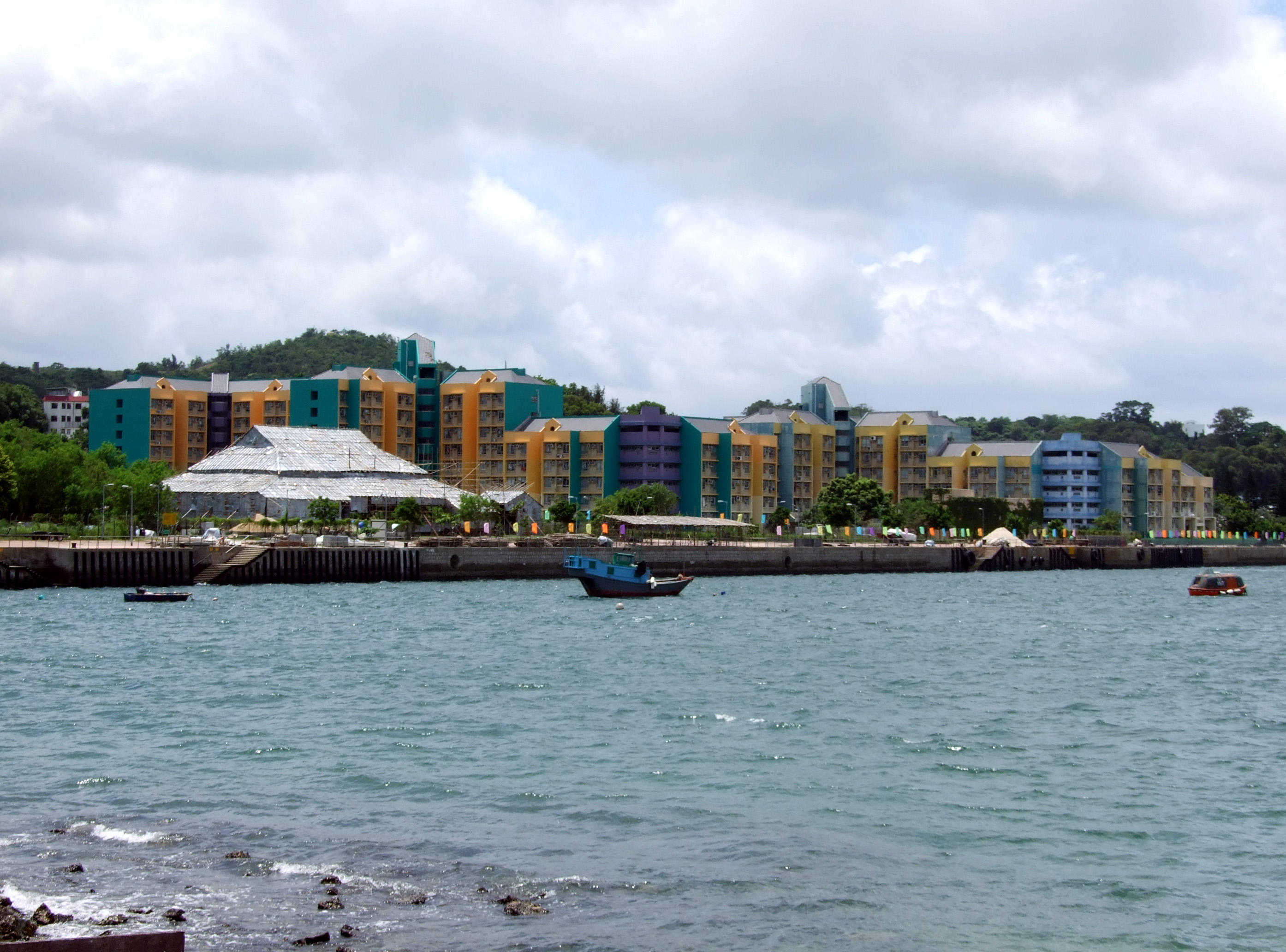 中文（香港）: 左為金坪邨，右為坪麗苑